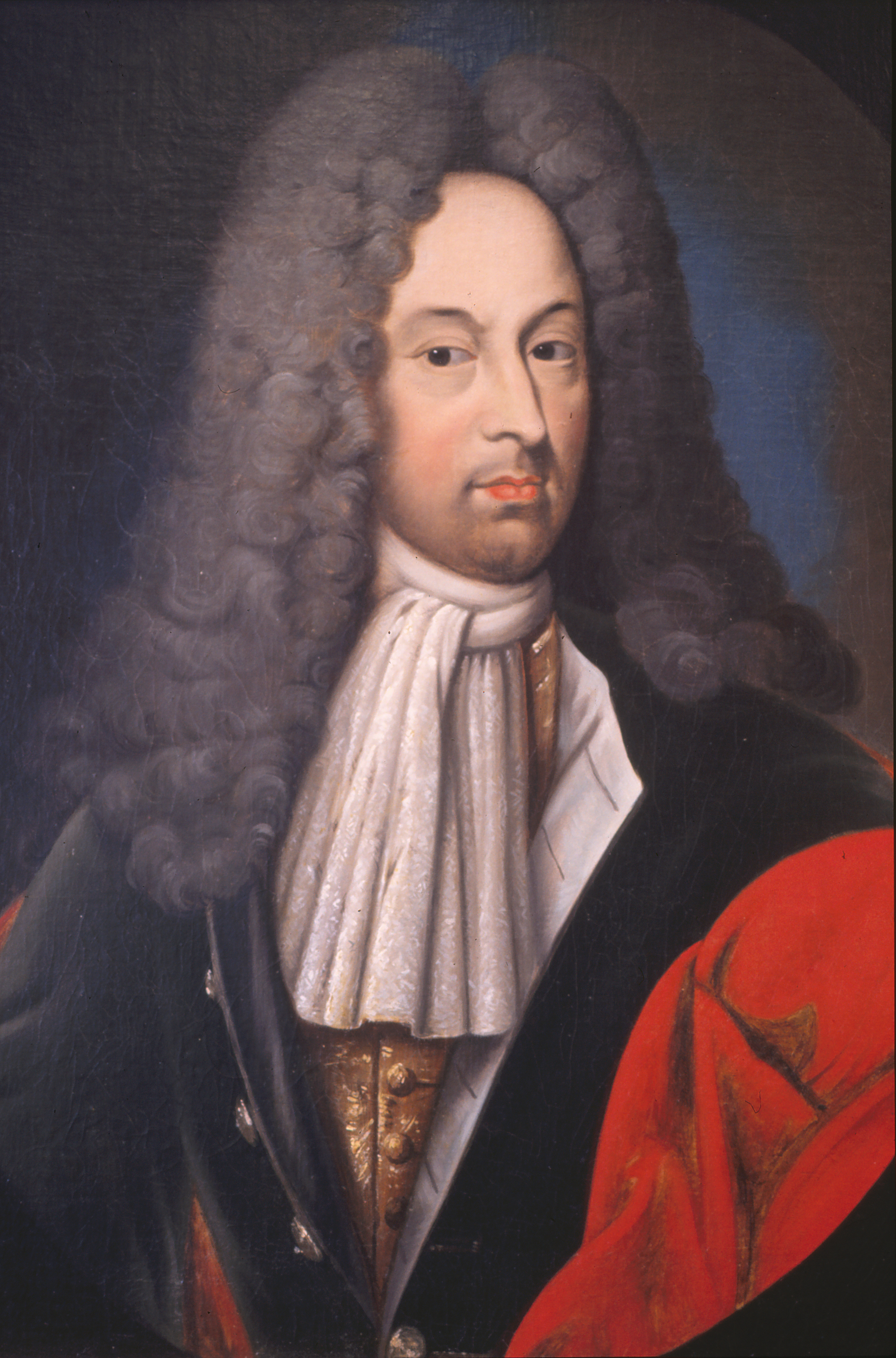 Angell, Albert Lorentzen, f. 4/11 1660, d. 13/9 1705, Præsident i Trondhjem, Fader til Legatstifteren Thomas Angell. - Brystbillede i Legemsstørrelse, tilhørende det Angellske Hus, Trondhjem. Se: C. J. Anker & H. J. Huitfeldt-Kaas: Katalog over malede Portræter i Norge (Kristiania 1886) s. 5. Maleriet befinner seg hos Thomas Angells Stiftelse. Fra Byantikvarens lysbildesamling.